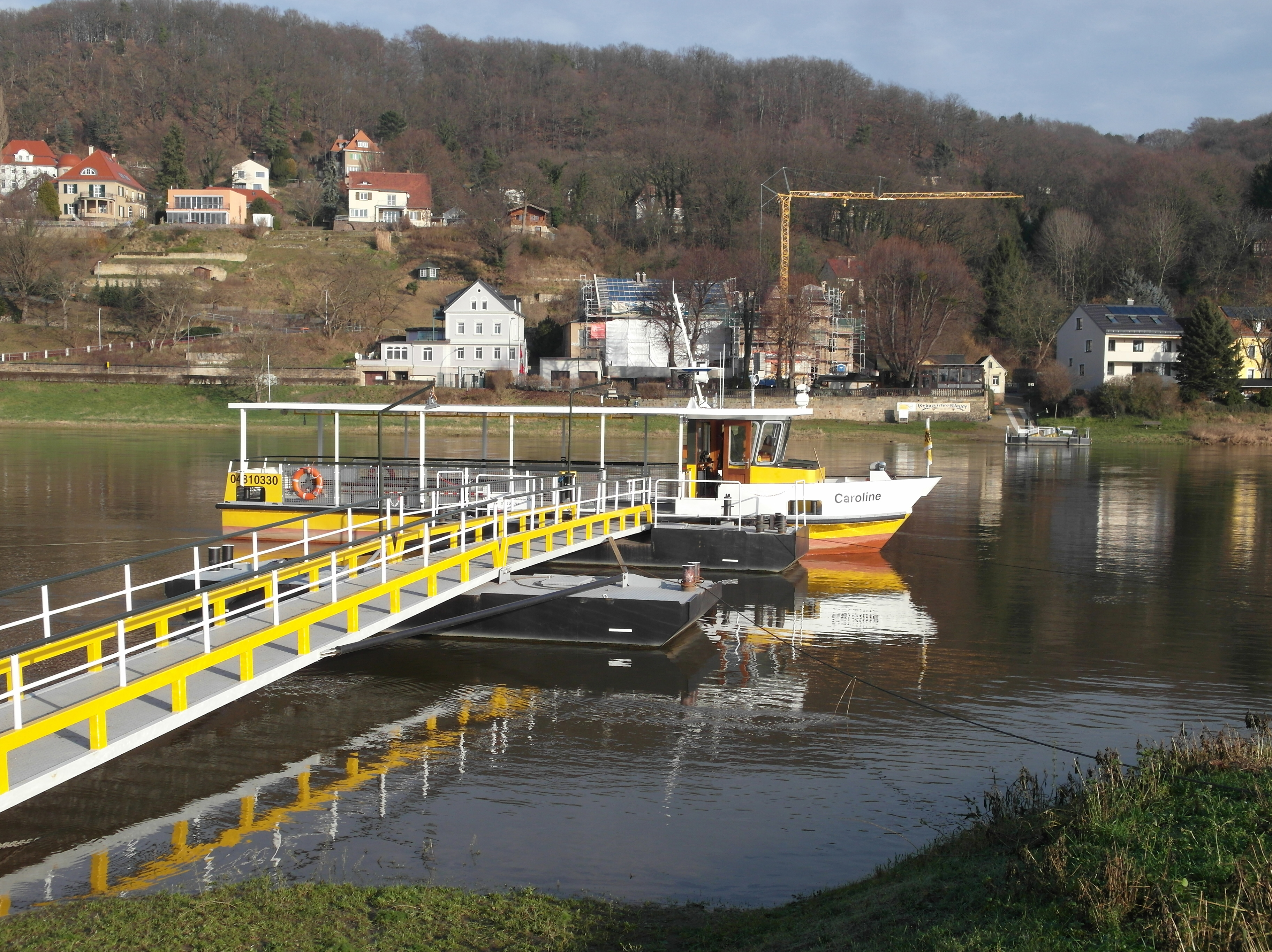 11.01.2018 01279 Dresden-Laubegast: Blick vom Laubegaster Ufer der Elbe zur Niederpoyritzer Fähre „Caroline“ (GMP: 51.032035,13.838738). Dahinter, am Niederpoyritzer Ufer sieht man links das Haus Pillnitzer Landstraße 177, ehemals Gaststätte "Zum Wachwitzkeller"(GMP: 51.032988,13.839534). Rechts daneben wird gerade das einstige Erbgericht Niederpoyritz, Pillnitzer Landstraße 179 (GMP: 51.032787,13.839930) saniert. [SAM3549.JPG]20180111415DR.JPG(c)Blobelt